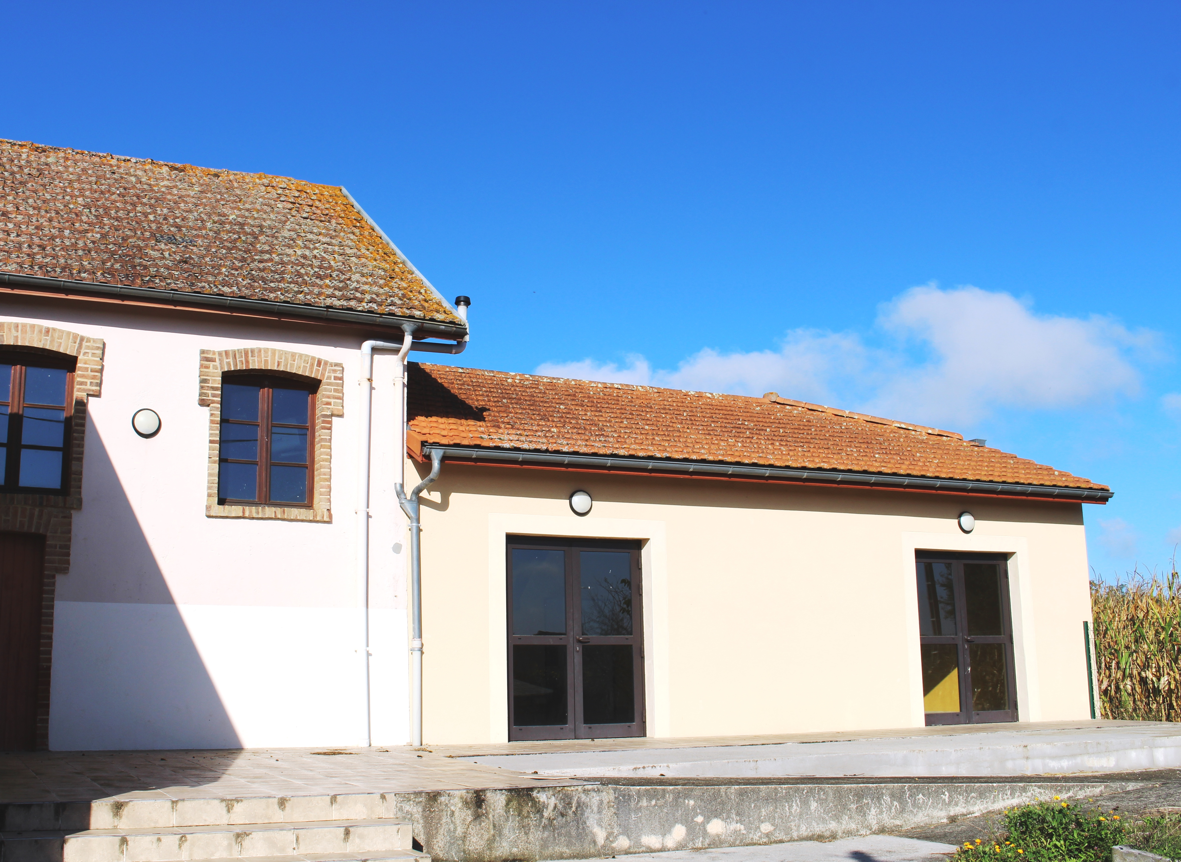 Salle des fêtes de Gonez (Hautes-Pyrénées)